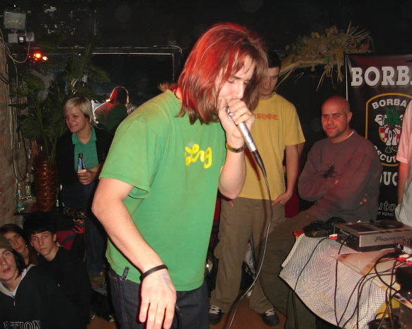 Yula, a horvát szájdobos Zágrábban